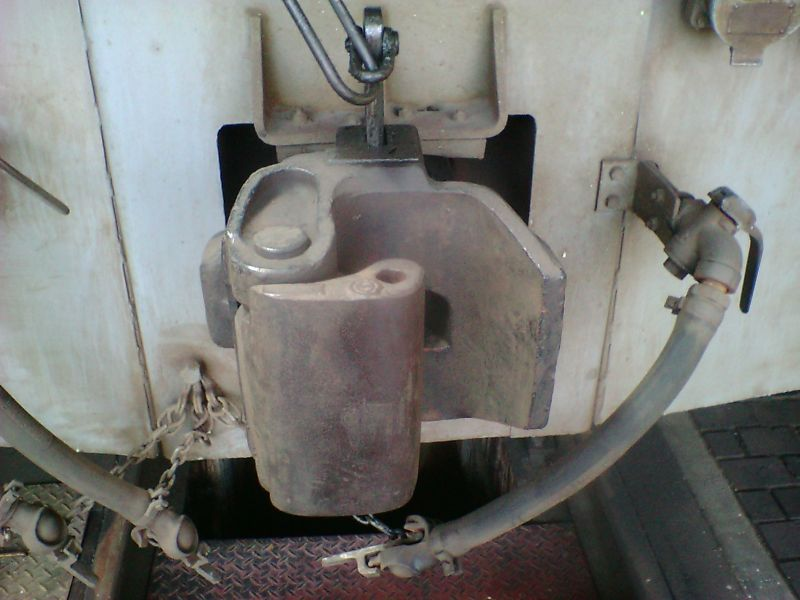 並形自動連結器・上作用式・錠控え位置 撮影車両：EF63